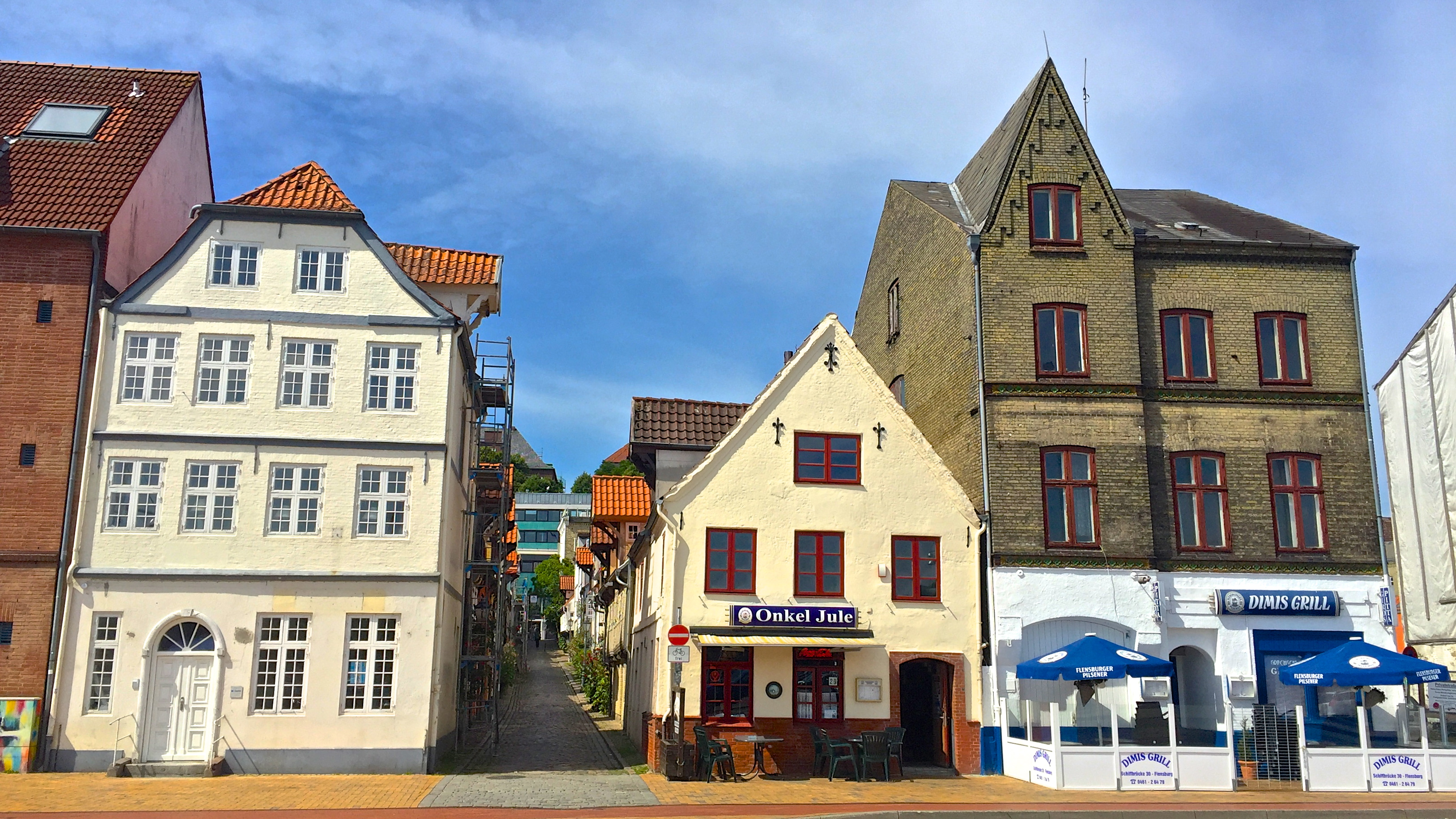 Flensburg, Germany